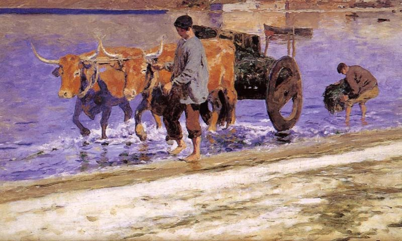 A carreta de argazo